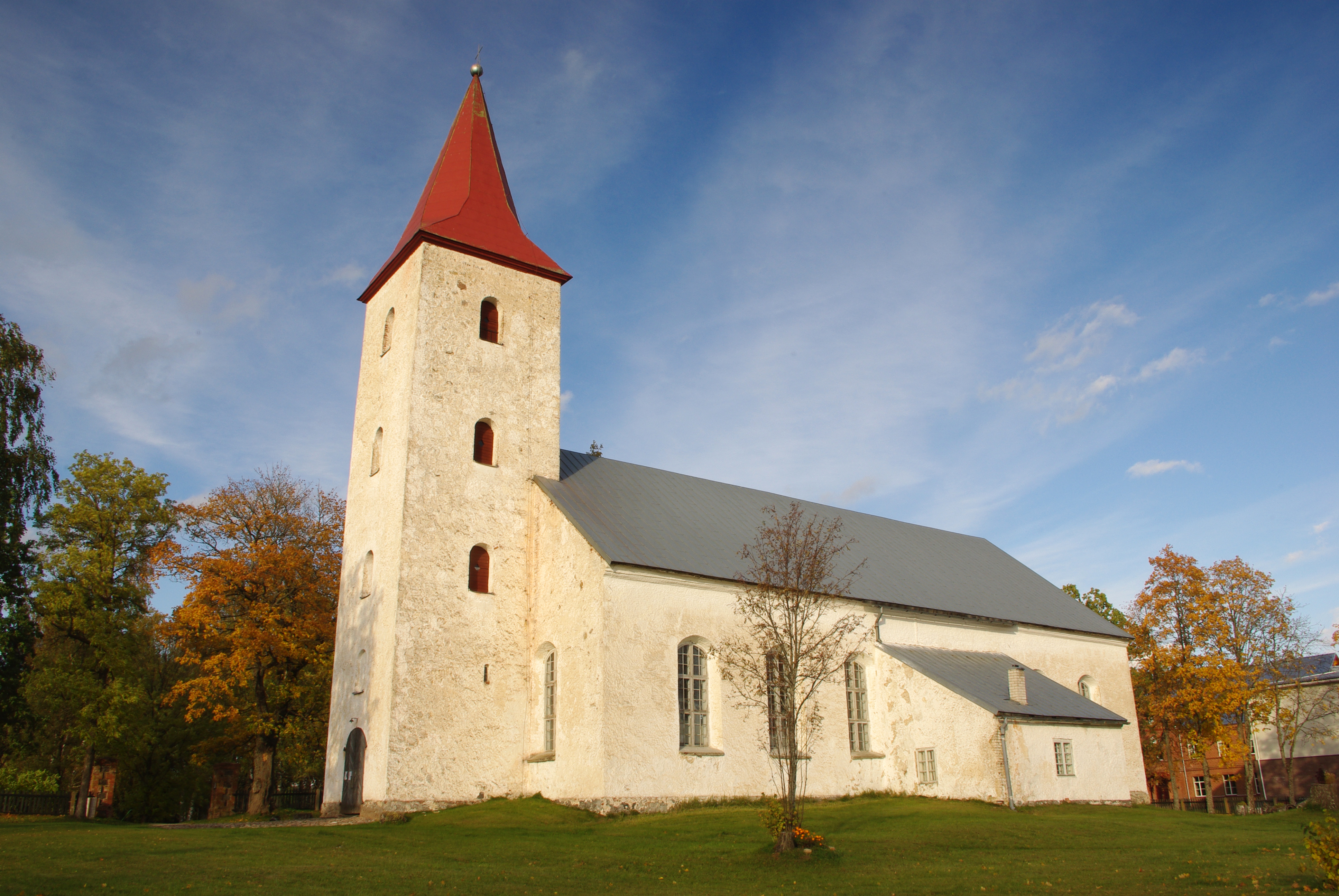 Rõuge Maarja kirik